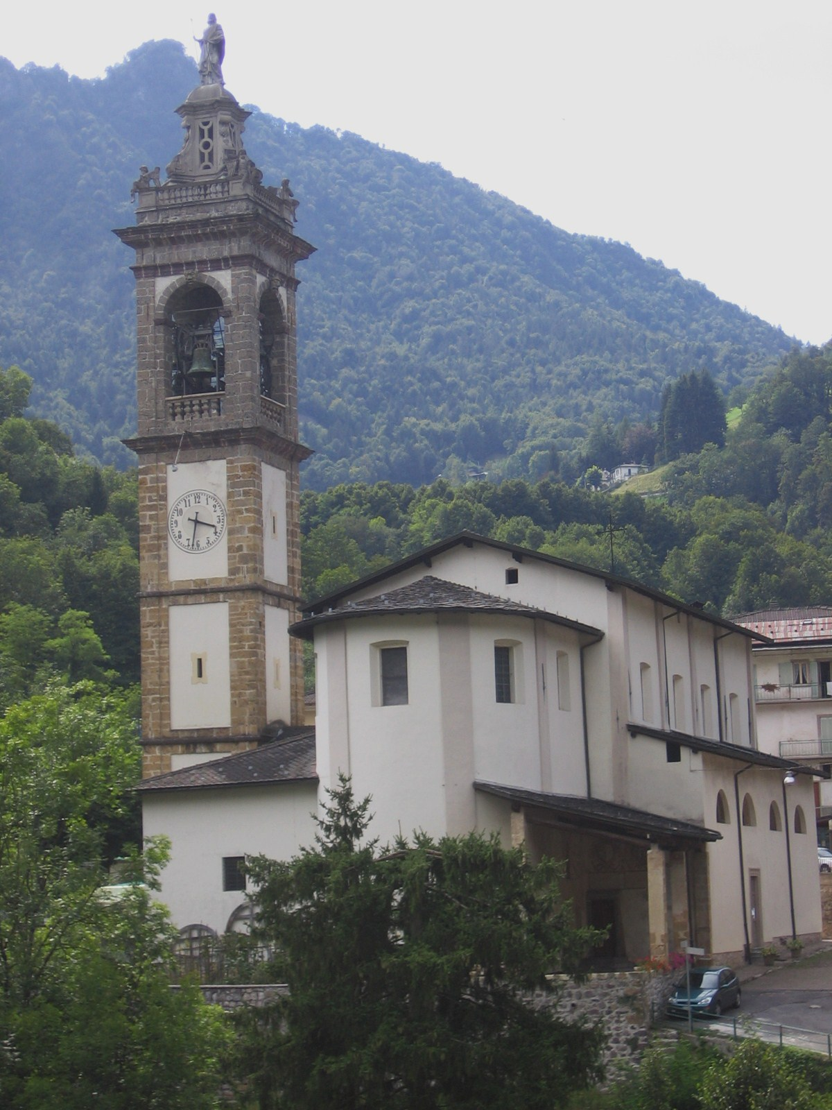 Averara, Bergamo, Italy